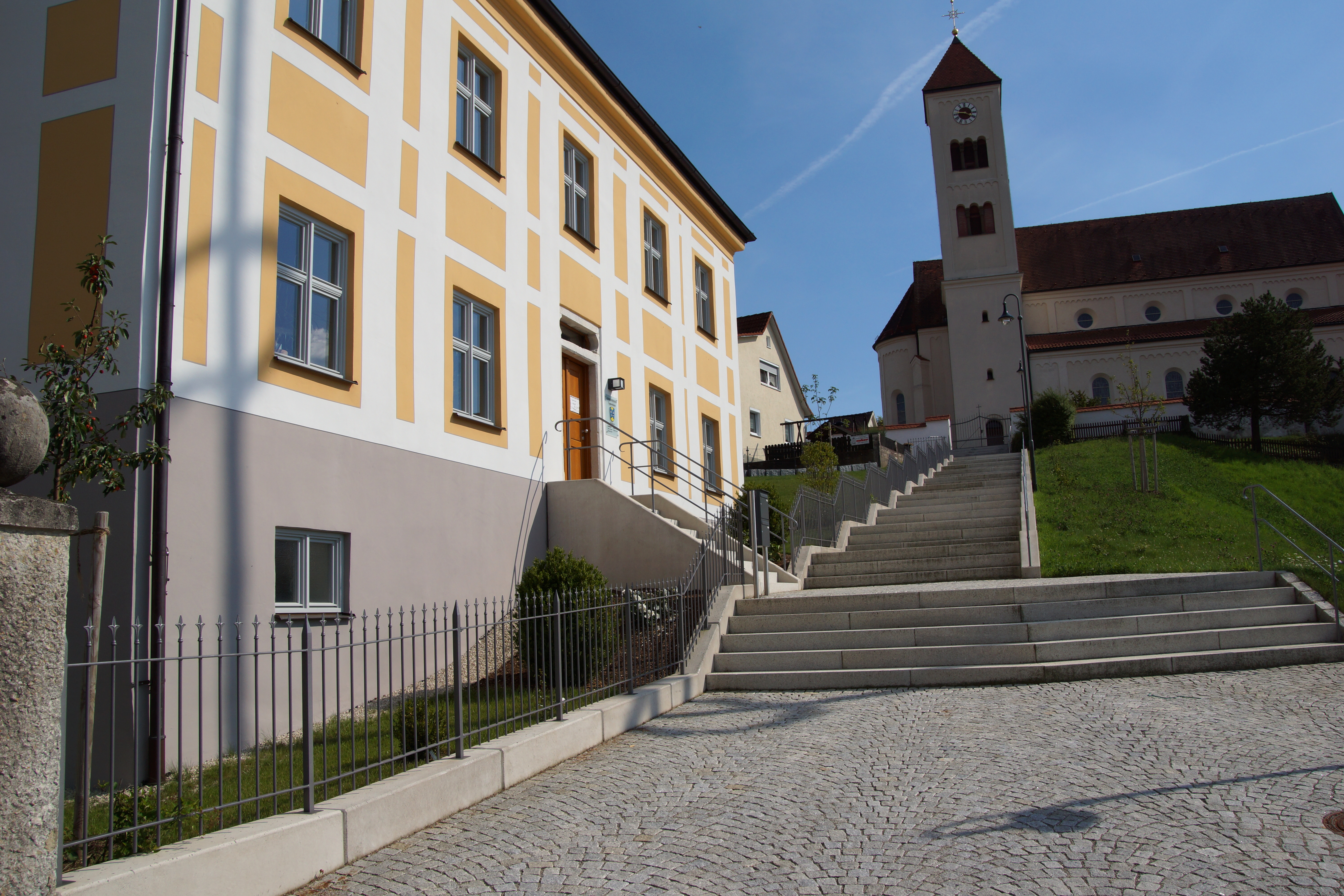 Das Gemeindehaus / Rathaus in Tagmersheim